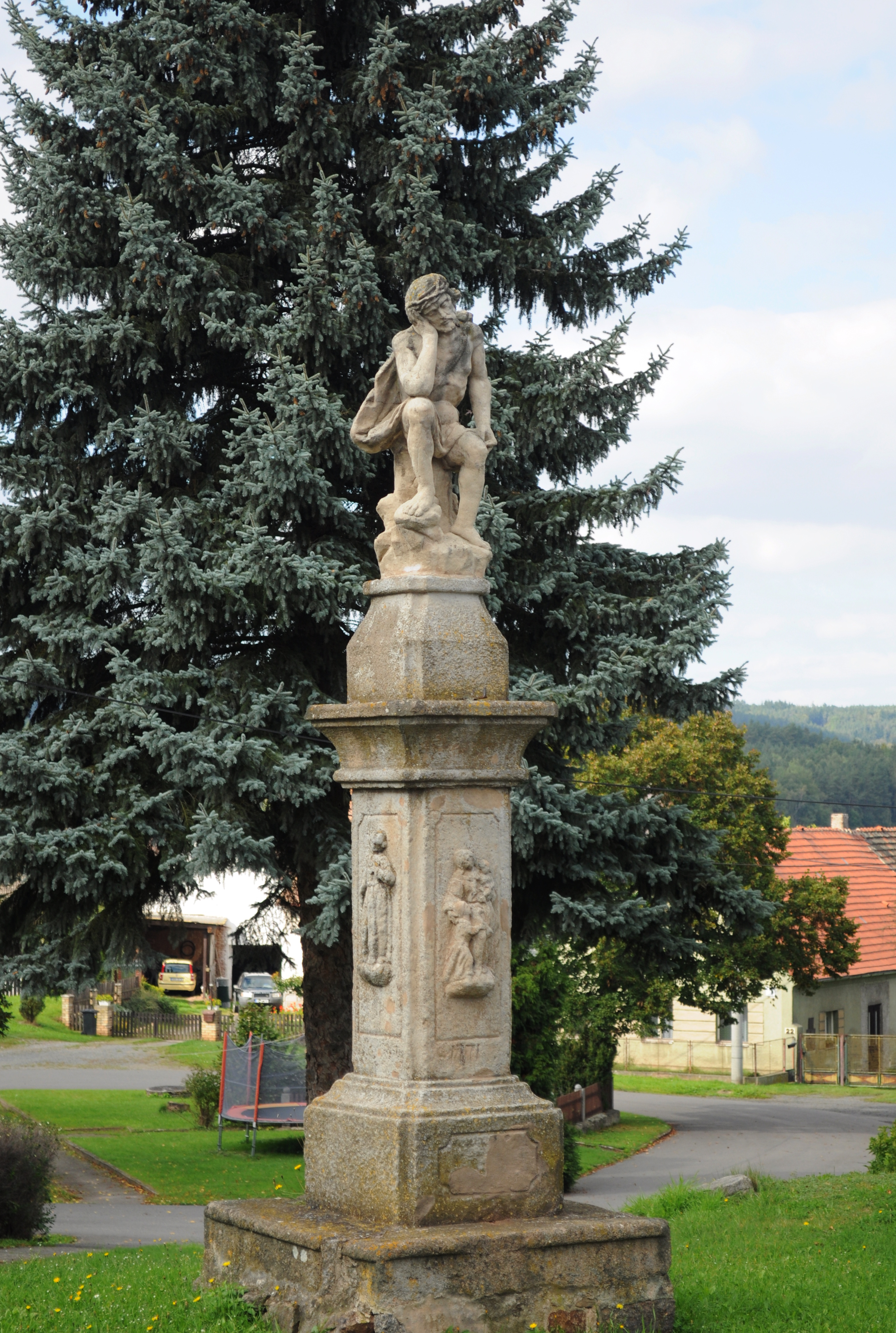 Socha Krista Trpitele, náves, Pastuchovice.